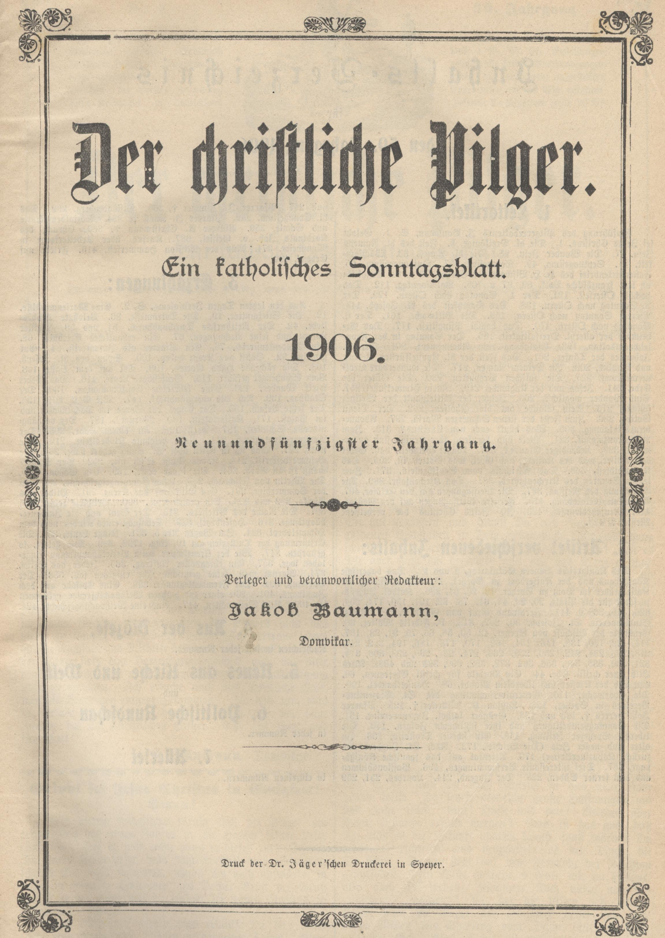 Tilelblatt "Der Pilger" 1906, mit Domvikar Jakob Baumann als Redakteur